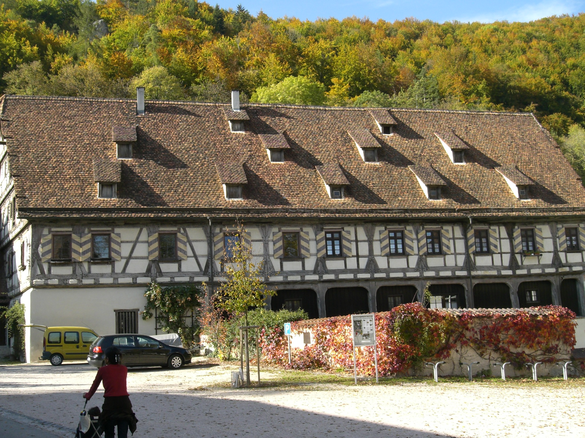 Klostergebäude (Convent) in Blaubeuren